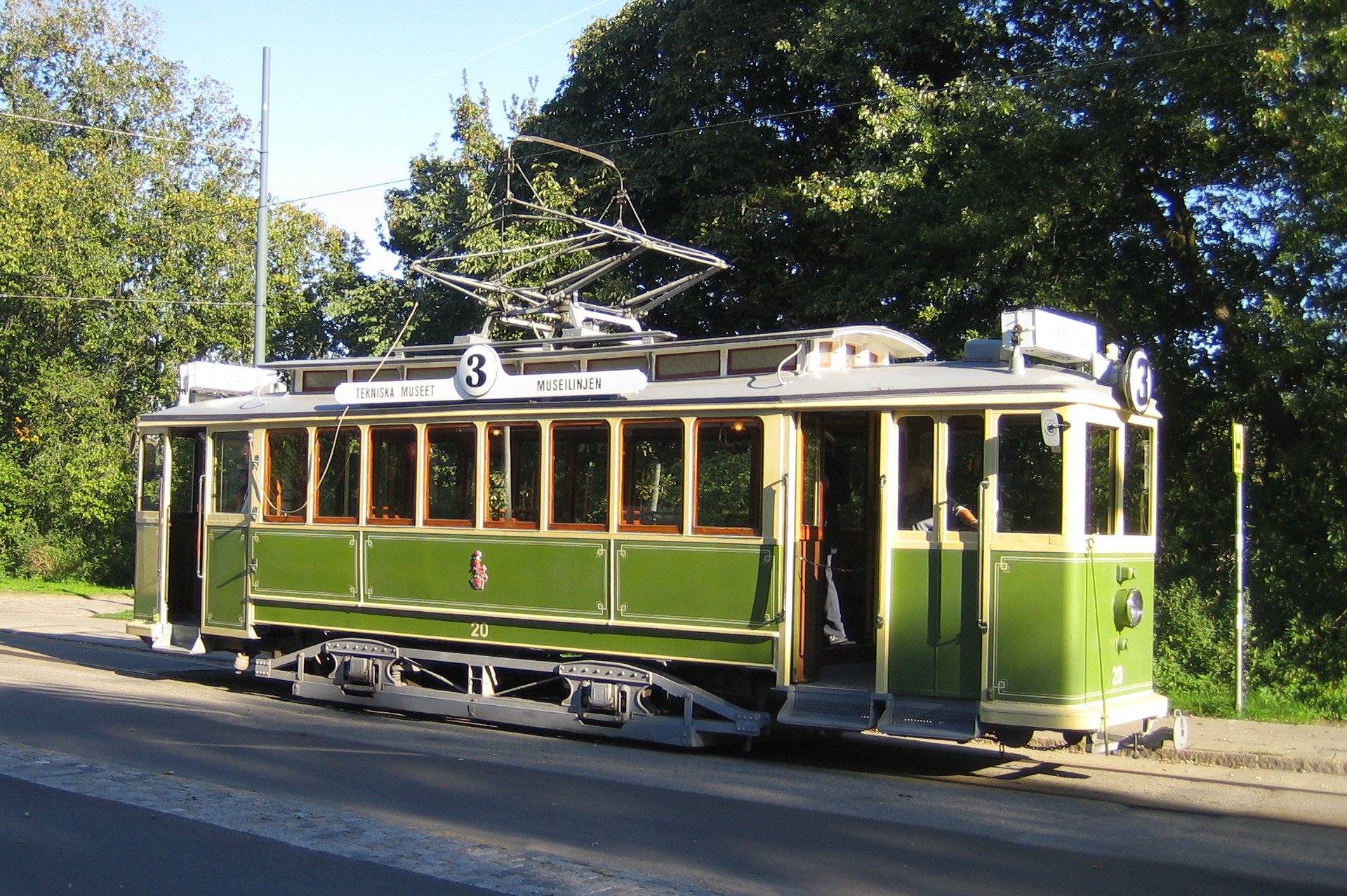 Museispårvagn nr 20, Malmö, Sweden